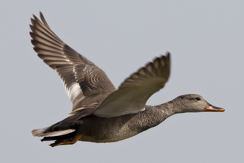 Duck 01